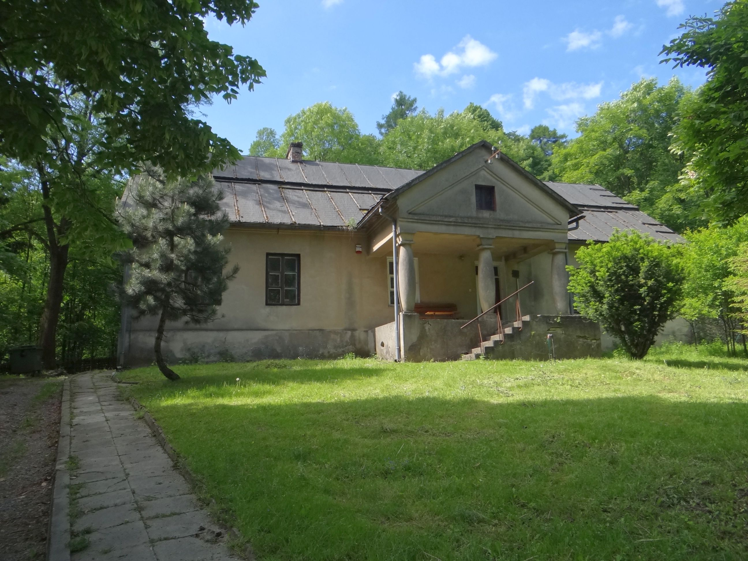 Dawny pałac w Smoleniu (województwo śląskie)